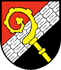 Die Schildfarben sind den Wappen der Herren von Teuffenbach zu Maierhofen (zweimal gespalten von Rot, Silber und Schwarz) und der Zebinger (gespalten von Rot und Kürsch) entnommen, die die ehemaligen Grundherren im Gemeindegebiet waren. Das goldene Pedum bezieht sich auf Bischof Ulrich von Seckau (1297—1308), der dem Geschlechte der Herren von Paldau entstammte. Das Wappen dieses Geschlechtes ist nicht überliefert, da keine Siegel an Urkunden erhalten geblieben sind und das Siegel Bischof Ulrichs nur das geistliche Amt kennzeichnet (Quelle: Dr. Reiner Puschnig, Steiermärkisches Landesarchiv, Neue steirische Gemeindewappen